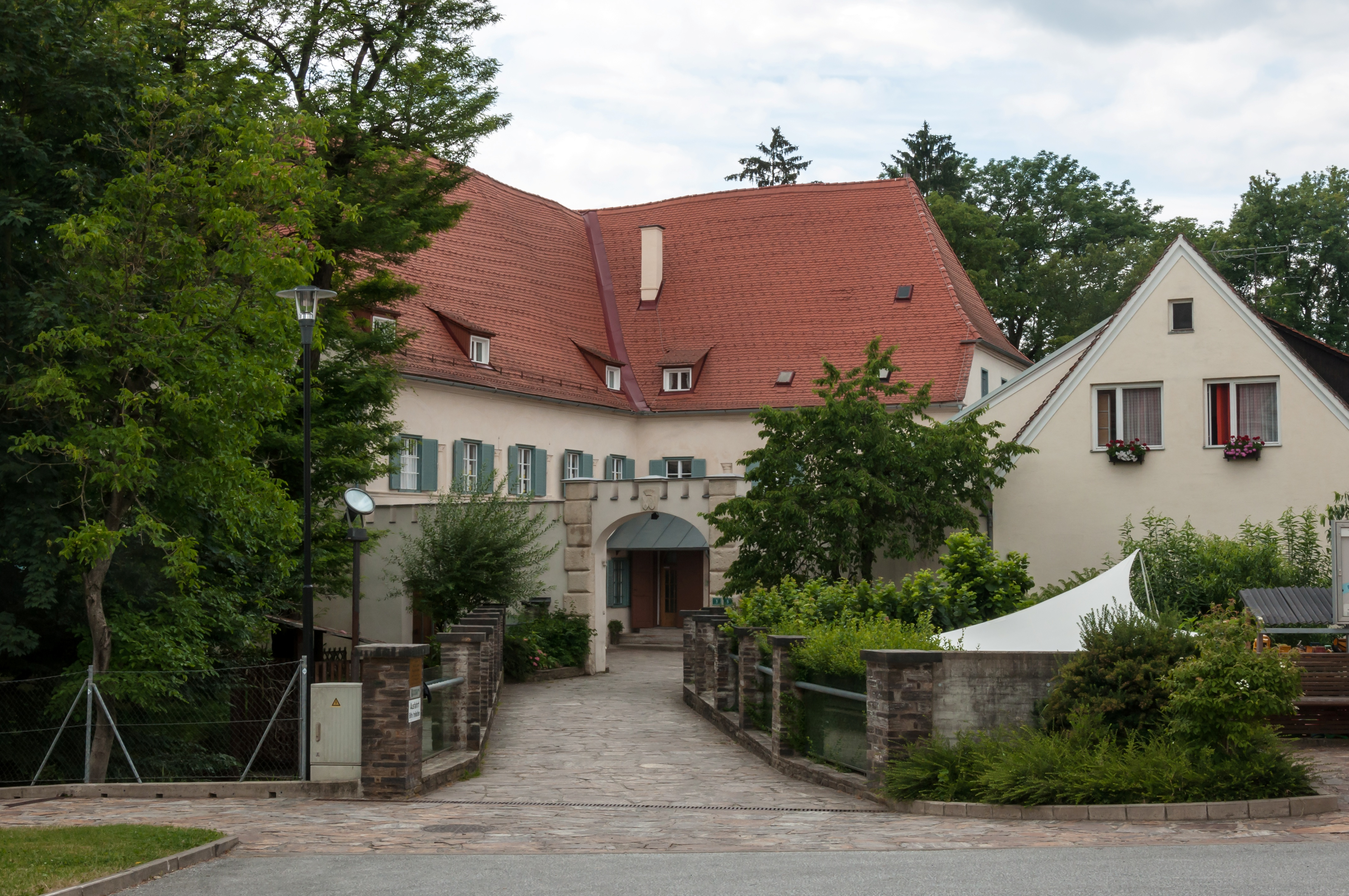 Der Haupteingang des Gjaidhofs (sog. Schloss Dobl). Hier ist die Private Neue Mittelschule und Hauptschule des Schulvereins der Barmherzigen Schwestern Schloss Dobl untergebracht.